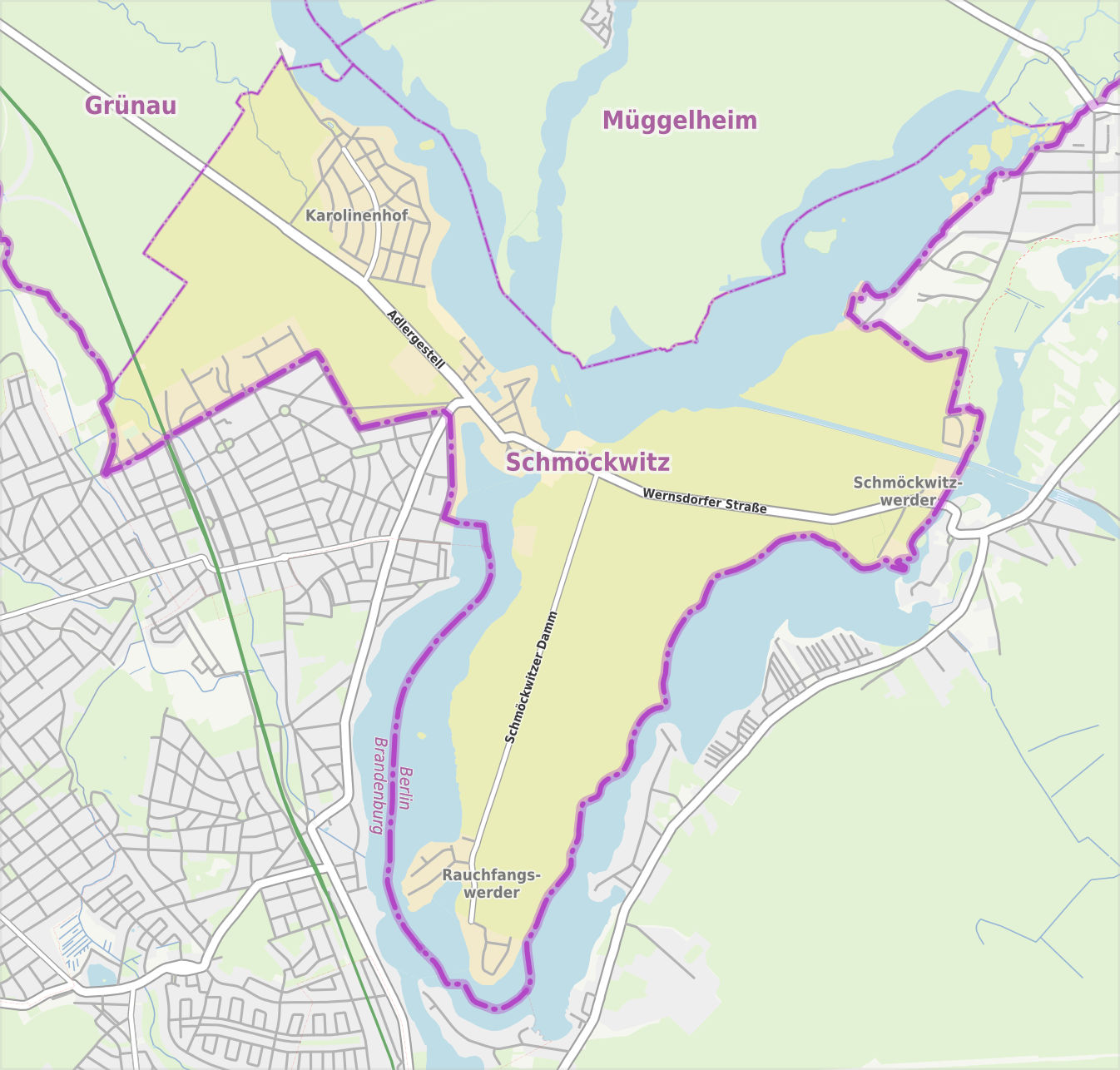 Übersichtskarte der Straßen und Ortslagen in Berlin-Schmöckwitz